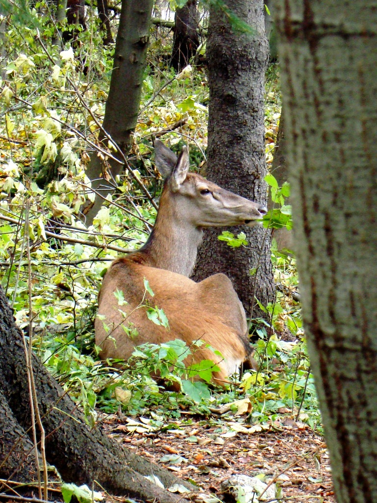 Las Chałubińskich, Zakopane